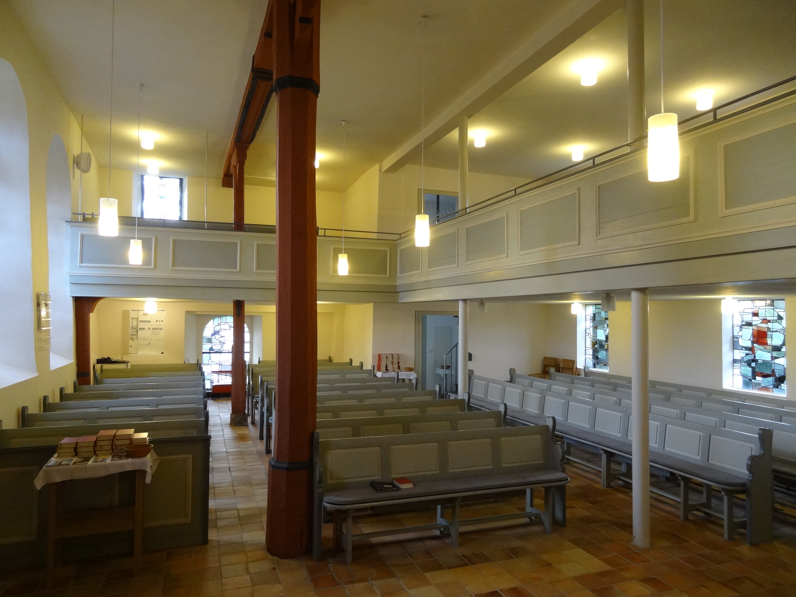 Evangelische Kirche Hausen (Pohlheim)